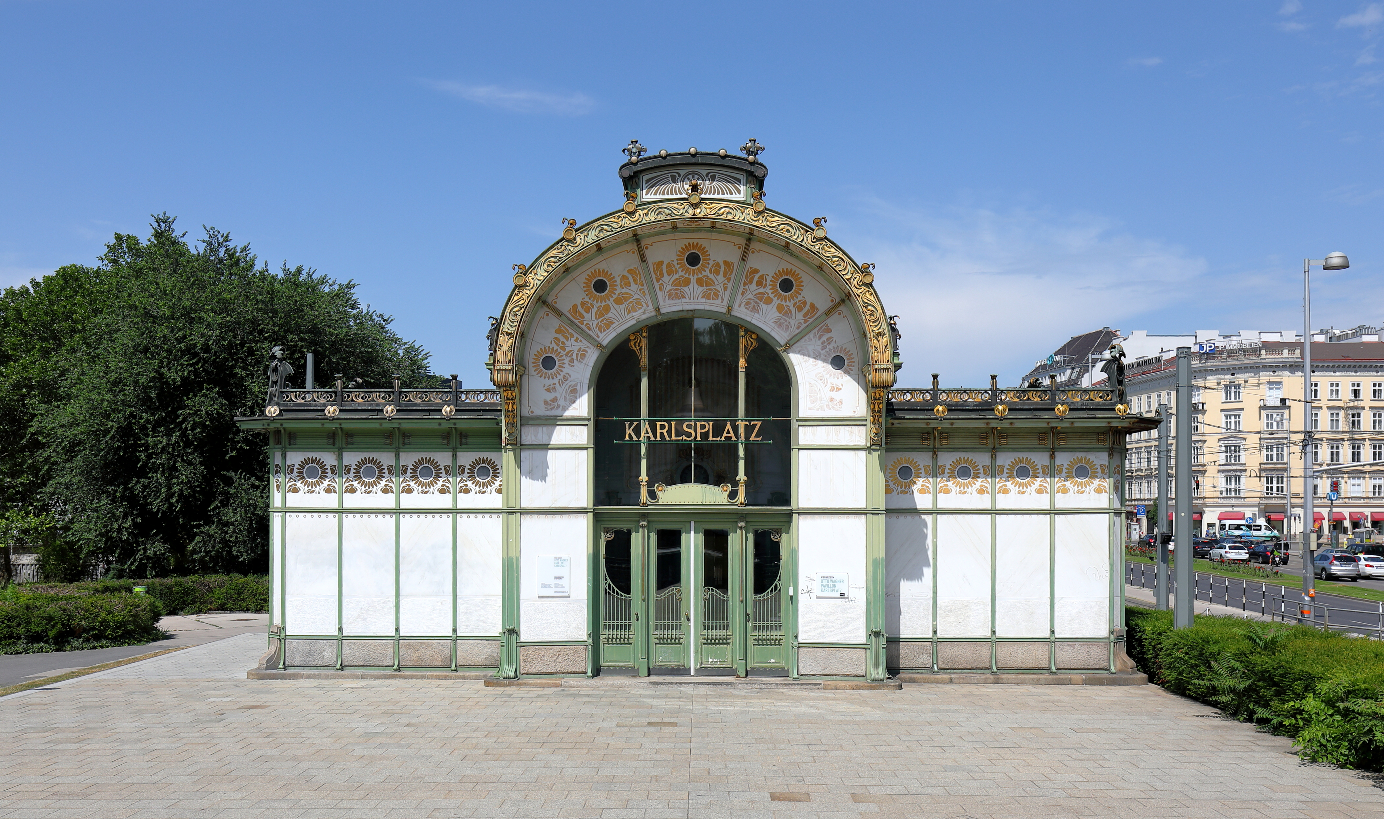 Ostansicht des ehemaligen westlichen Stadtbahn-Pavillons am Karlsplatz im 4. Wiener Gemeindebezirk Wieden.1898 wurden nach einem Entwurf von Otto Wagner zwei identische Zugangsgebäude für die Stadtbahnstation Karlsplatz errichtet. Die vielen dekorativen Details machten die Station zu einem Musterbeispiel des Wiener Jugendstils. Metall und Holz wurden in Apfelgrün gestrichen, der Signalfarbe der Stadtbahn. Hinzu kam Gold und weißer Marmor an der Außenseite. Durch den Bau der U-Bahn-Station Karlsplatz wurden die Pavillons abgetragen und nach Protesten 1977 wieder aufgestellt. Aktuell (2018) wird der westlich Pavillon von Wien Museum genutzt und der östliche als Kaffeehaus.